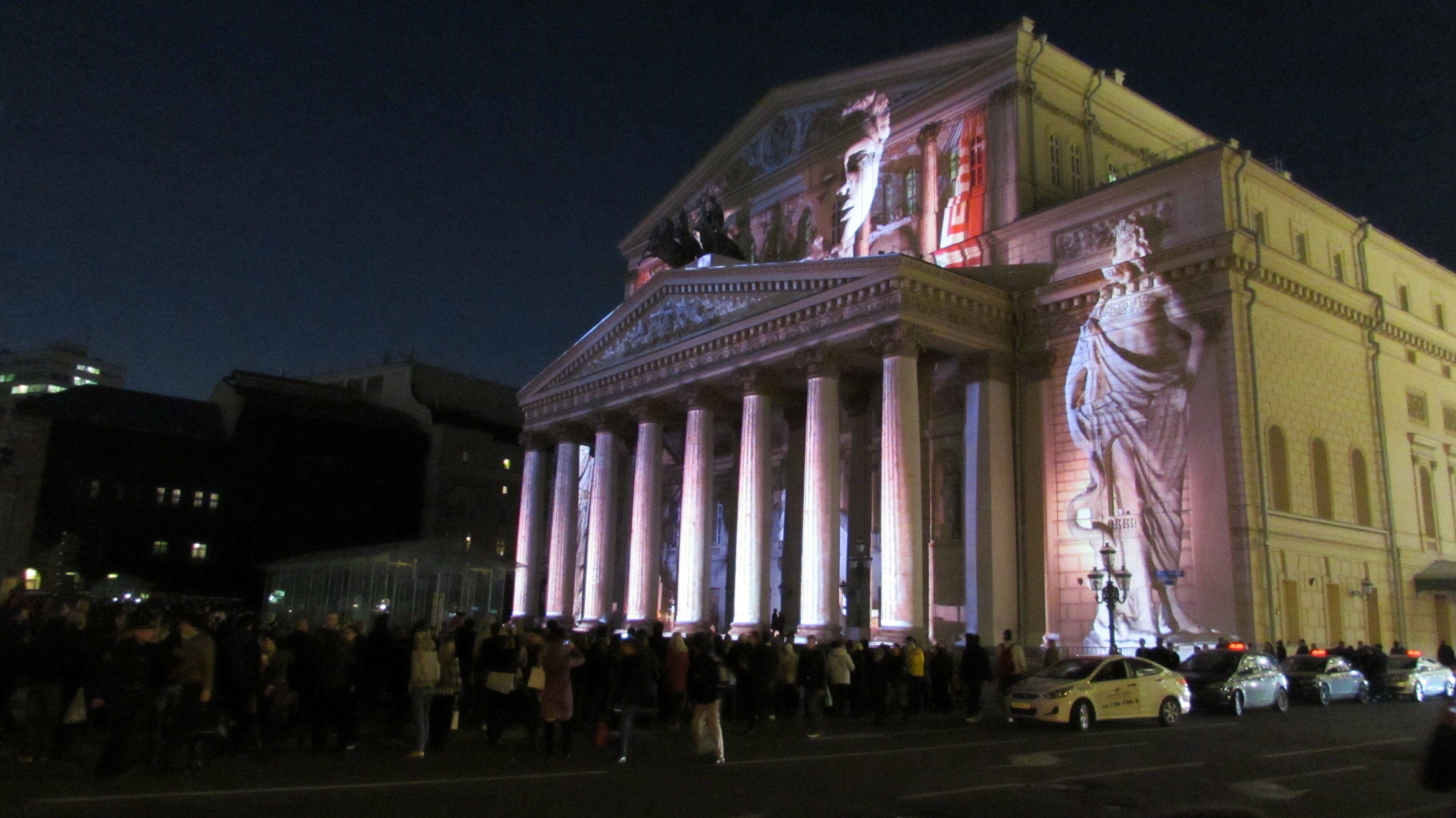 Moskau Bolschoi Theater LightShow